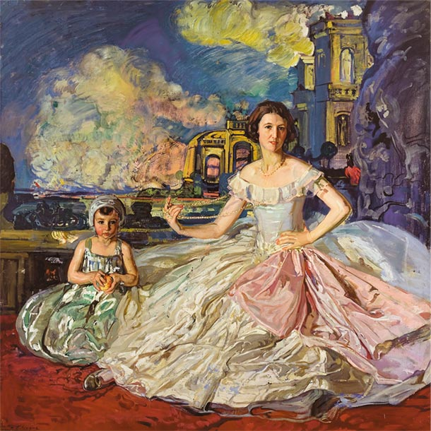 Encarna y su hija, obra realizada por el pintor Antonio Ortíz Echagüe (1883-1942) en el año 1926